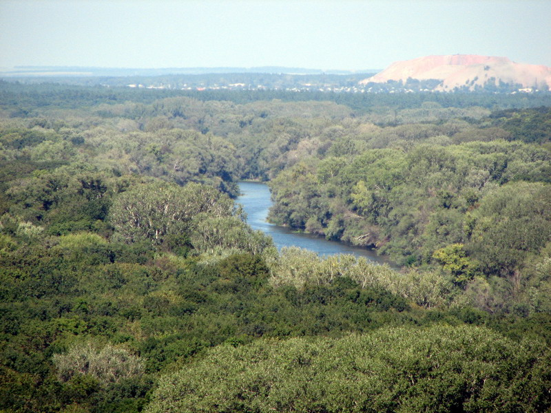 Seversky Donets near Shipilivka, Ukraine